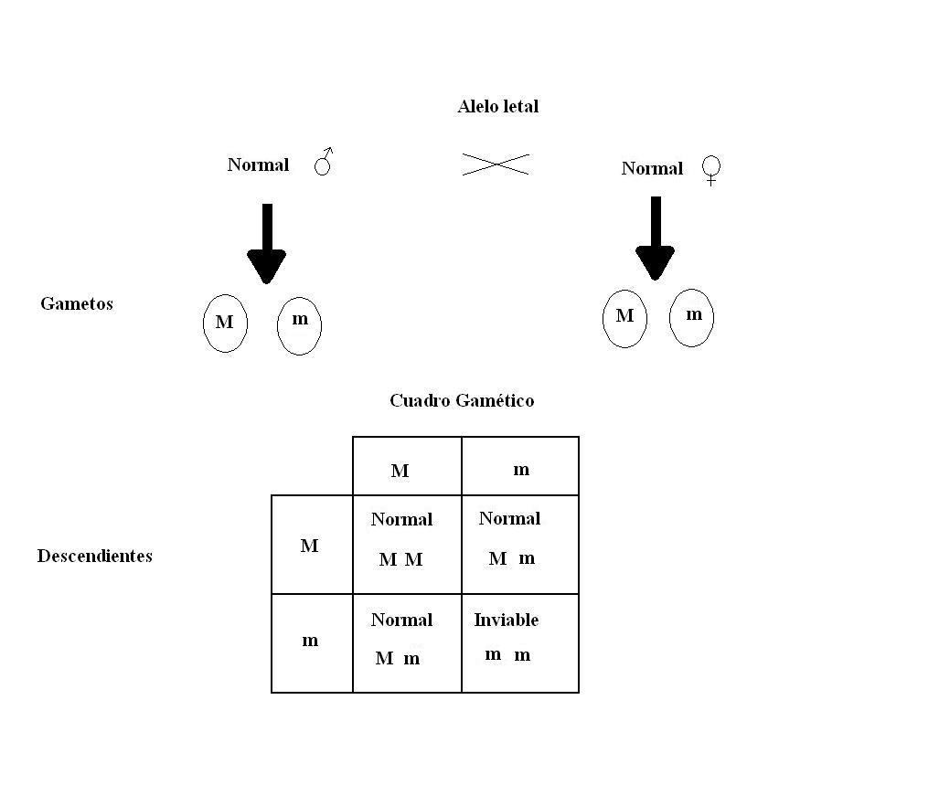 Cruzamiento con un alelo letal recesivo.